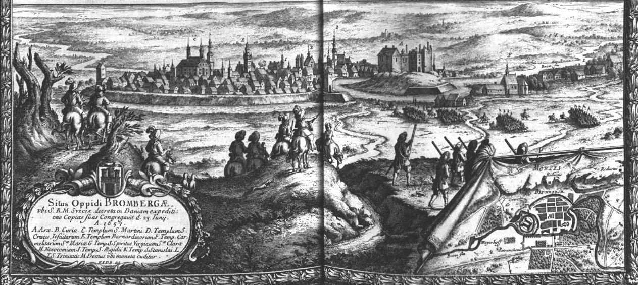 Sztych Erika Dahlberga z lipca 1657 r. przedstawiający miasto Bydgoszcz wraz ze zniszczonym zamkiem